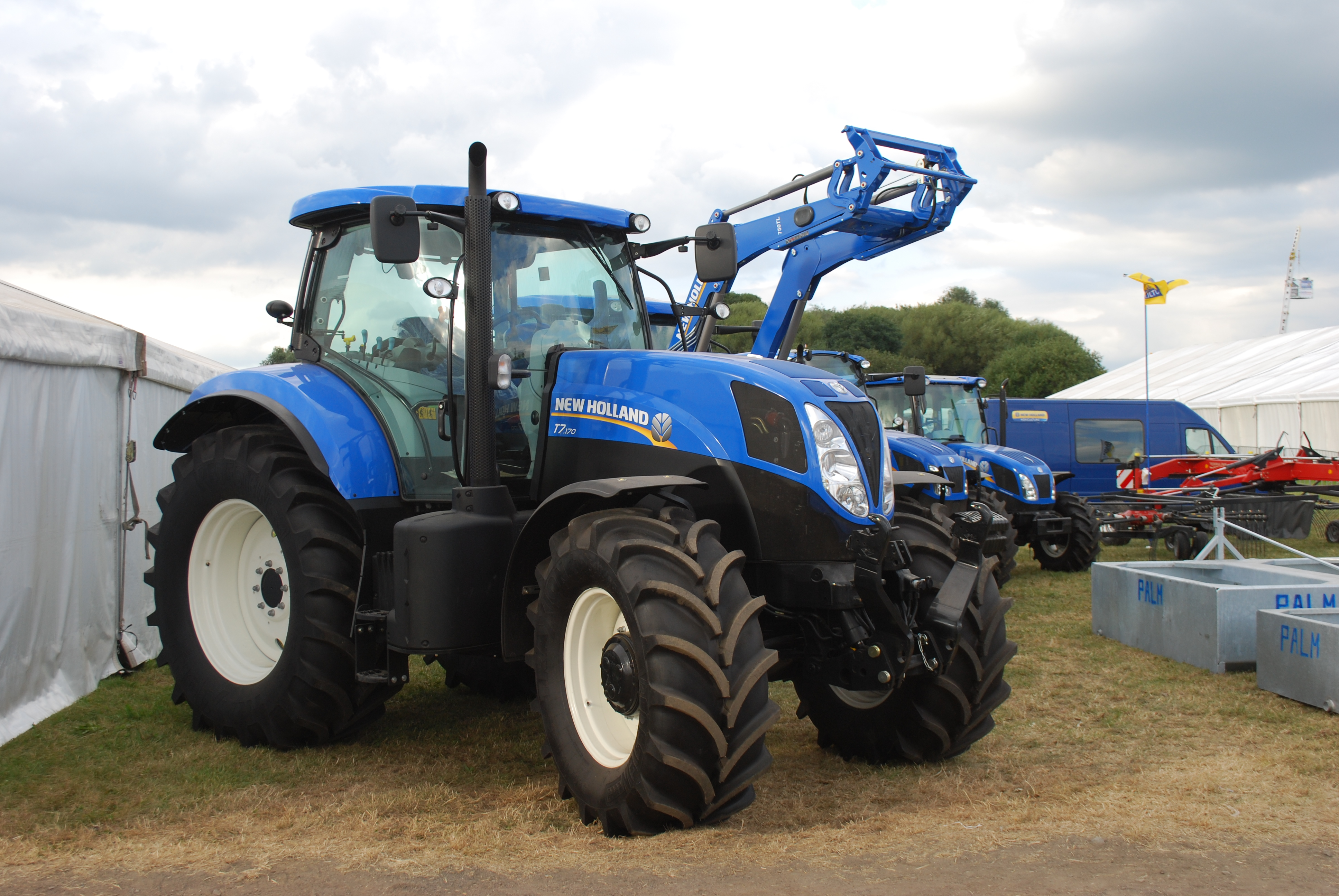 Vue de la foire agricole de Battice, le 31 août 2013.